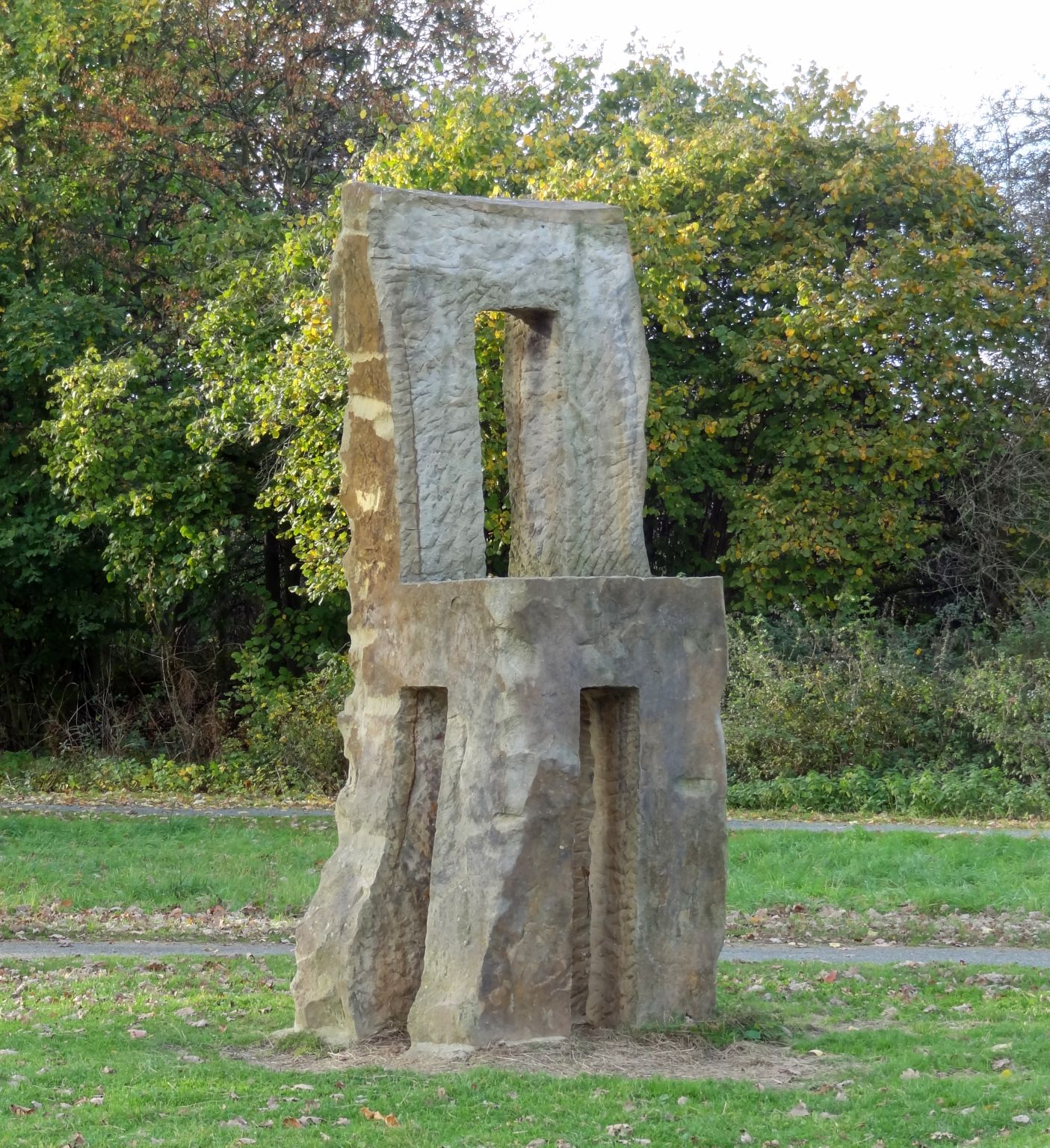 Steinskulptur in Gestalt eines Stuhles im Braunschweiger Westpark.